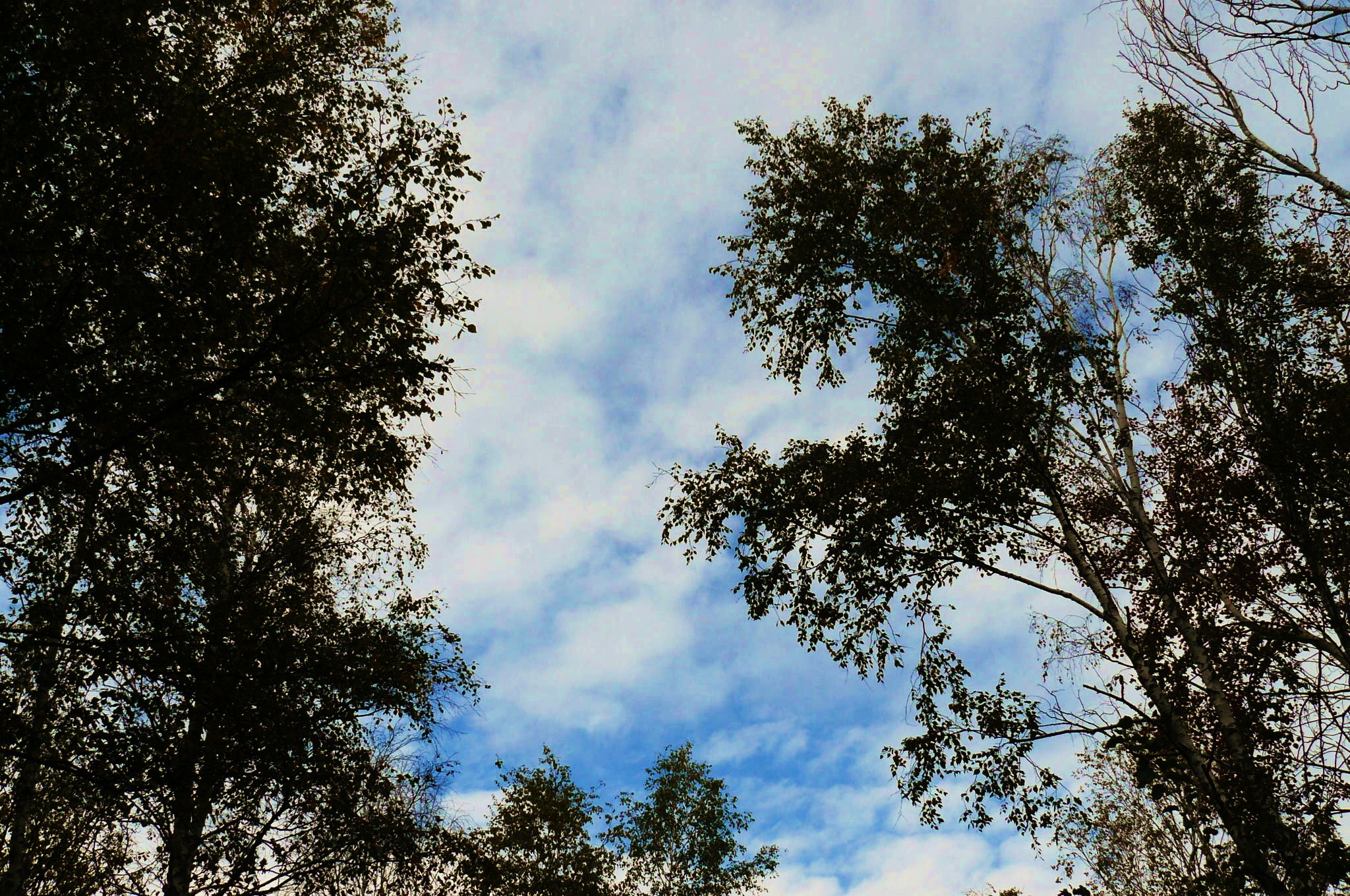 Roślinność Bagna Chlebowo.